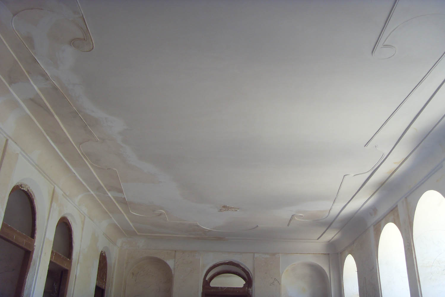 تالار فوقانی خانه شهریاری در یانه سر هزار جریب بهشهر